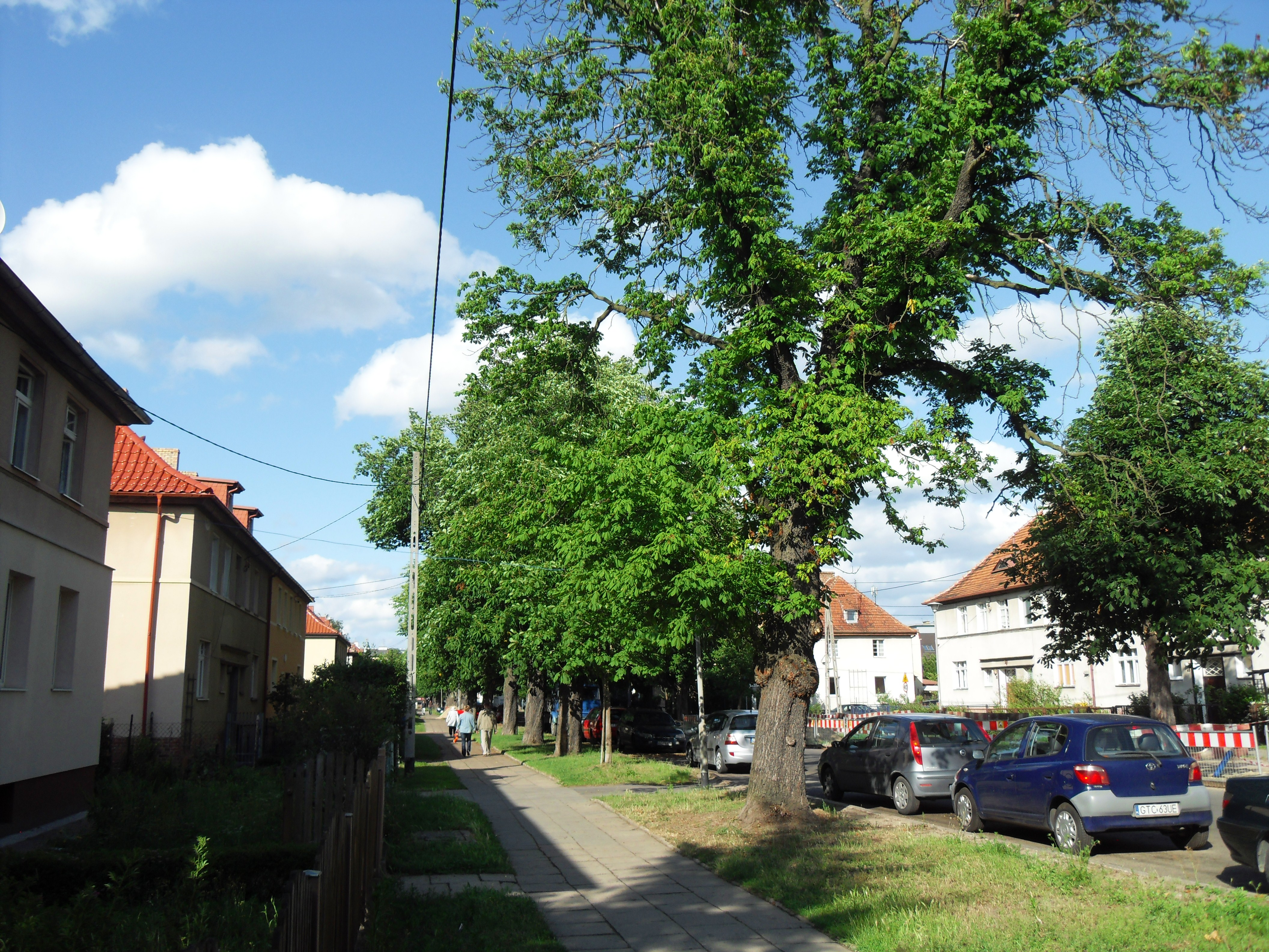 Gdańsk Strzyża, ulica Chopina (część wschodnia).